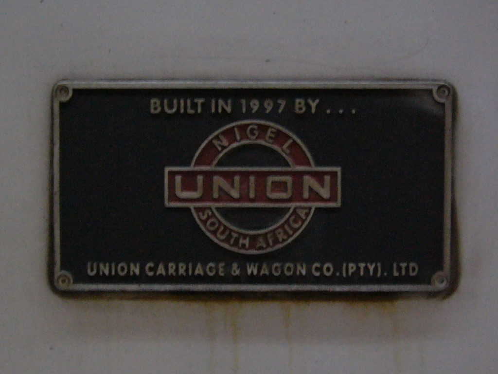 台鐵E1000型推拉式電車機車外的聯合鐵路客貨車公司銘板